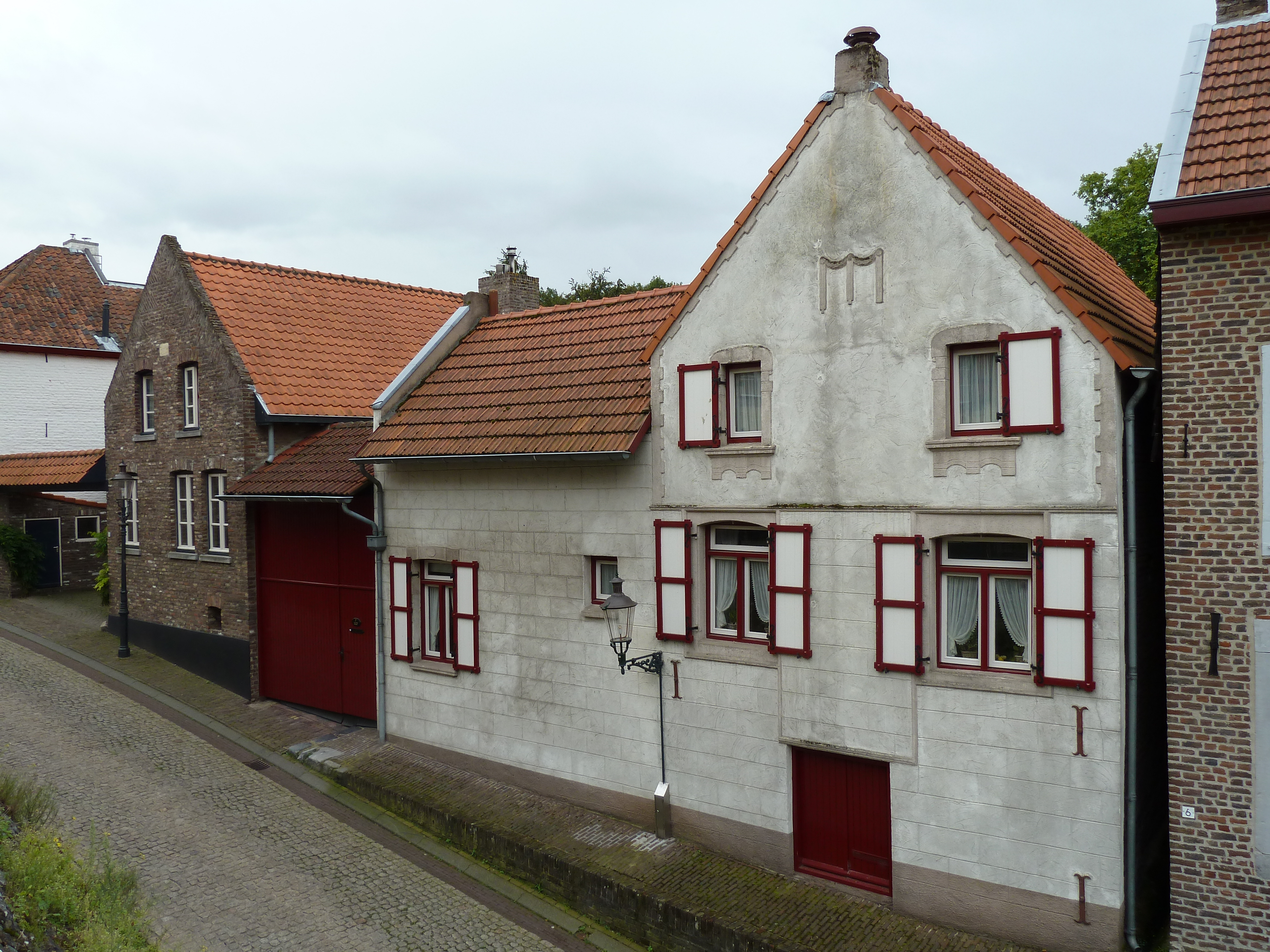 Maasberg 7 en 8, Elsloo, Limburg, Nederland